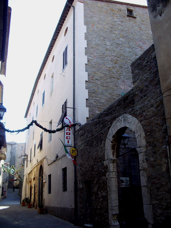 Facciata principale del Palazzo del Conte a Scarlino (prospetto lungo sul corso)